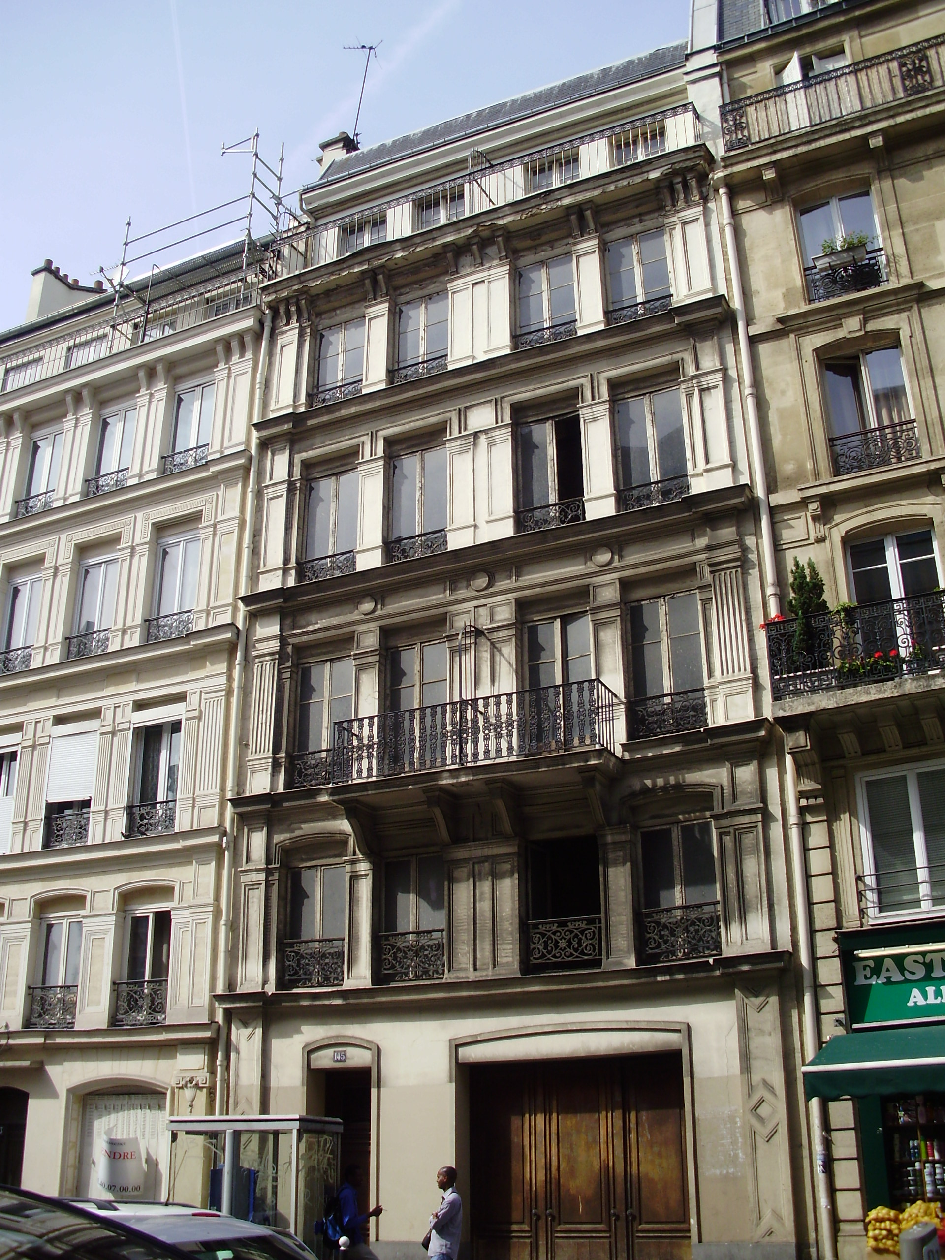 Immeuble du 145, rue La Fayette, à Paris 10e, France, servant de bouche d'aération pour le tunnel de la ligne B du RER d'Île-de-France.